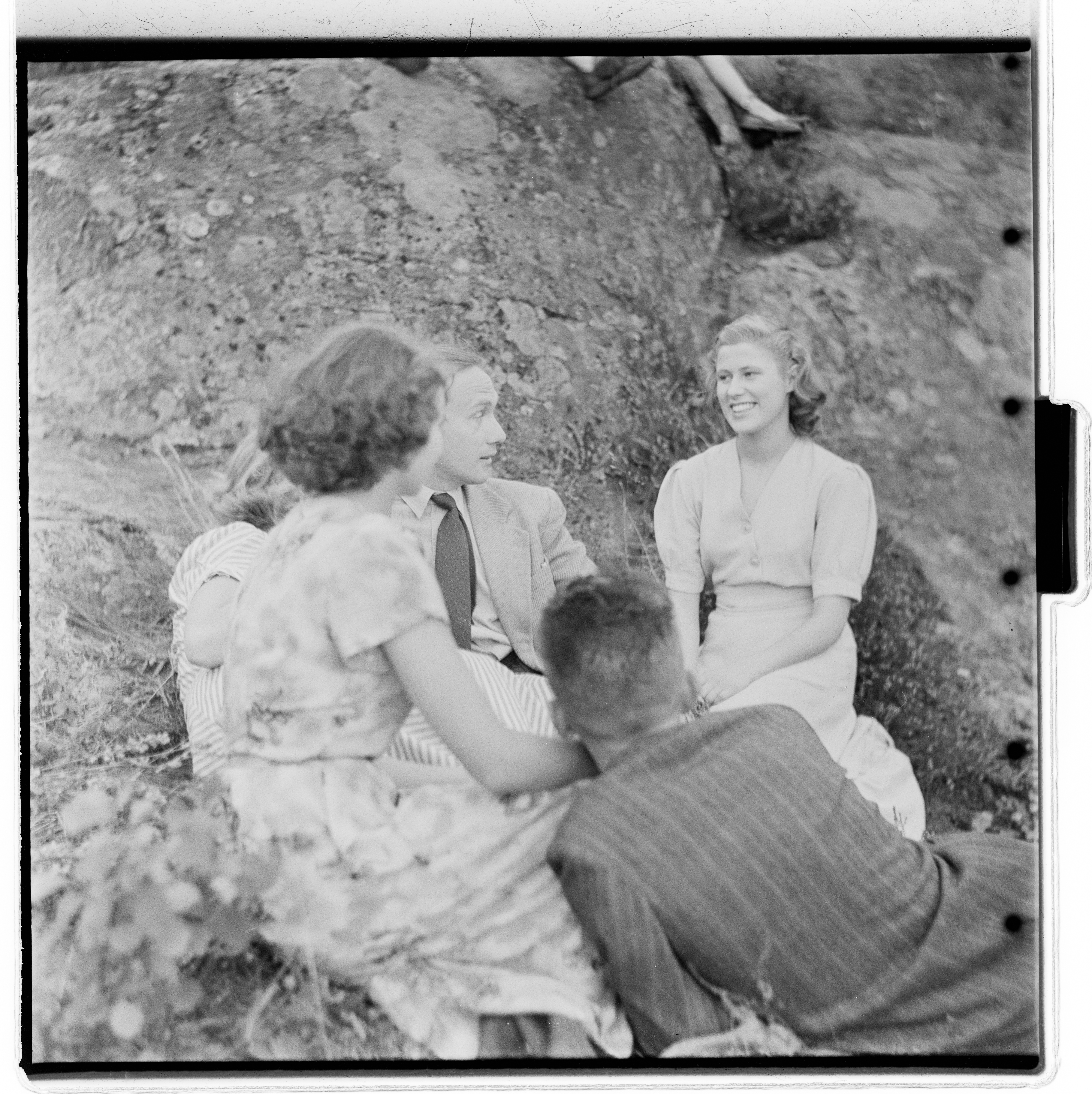 Bildet er hentet fra Arkivverket. Foto fra innspillingen av den norske filmen "Andrine og Kjell". Arkivinstitusjon : Riksarkivet Arkivnavn : Billedbladet NÅ Sted : Norge, Ukjent, Ukjent, Avbildet